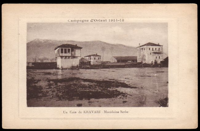 Кравари през Първата световна война.